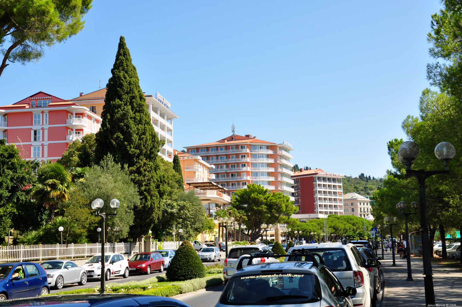 Portoroz